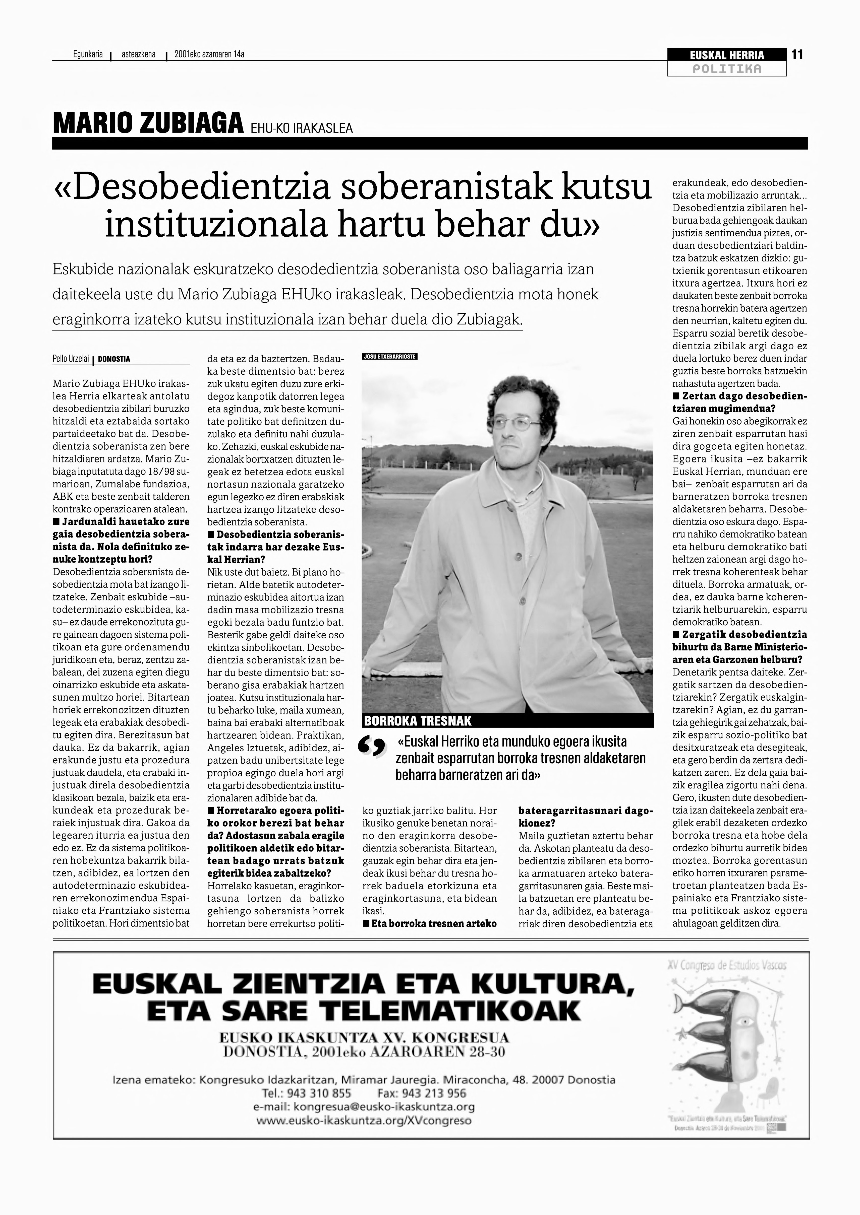 Mario Zubiaga (Euskaldunon Egunkaria, 2001-11-14) "Desobedientzia soberanistak kutsu instituzionala hartu behar du"